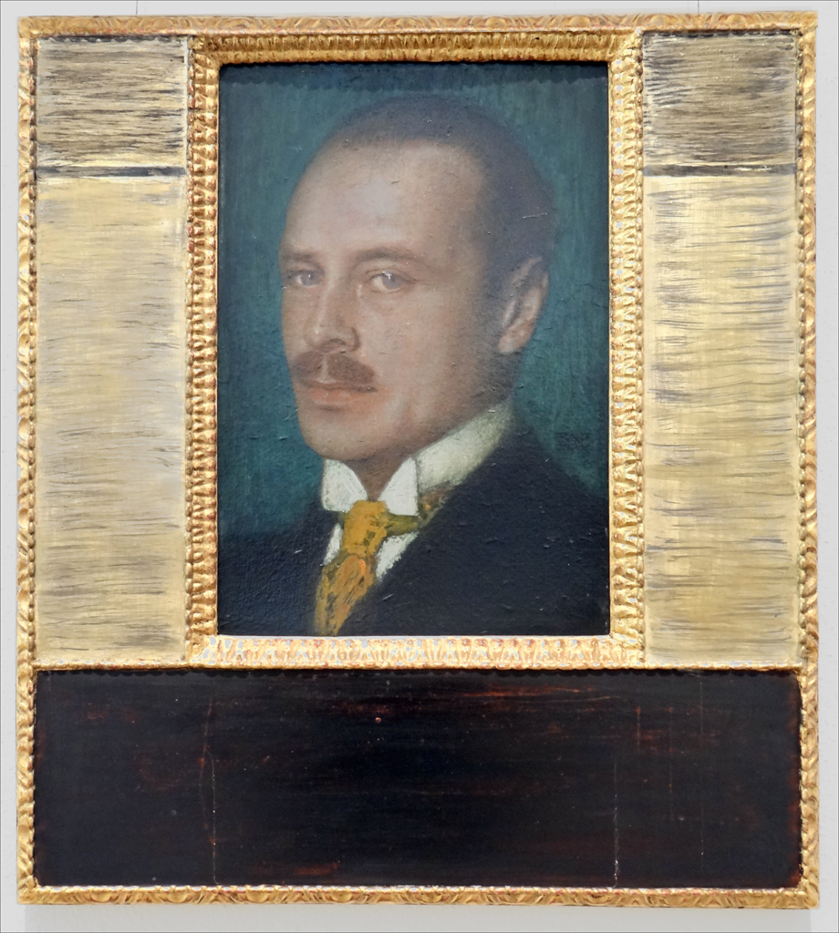 Portrait du Grand-Duc Ernst Ludwig, Louis V de Hesse Fondateur de la colonie d'artistes de Darmstadt œuvre de Franz von Stuck 1907 Huile sur toile Musée de la colonie d'artistes de Darmstadt autre œuvre de von Stuck